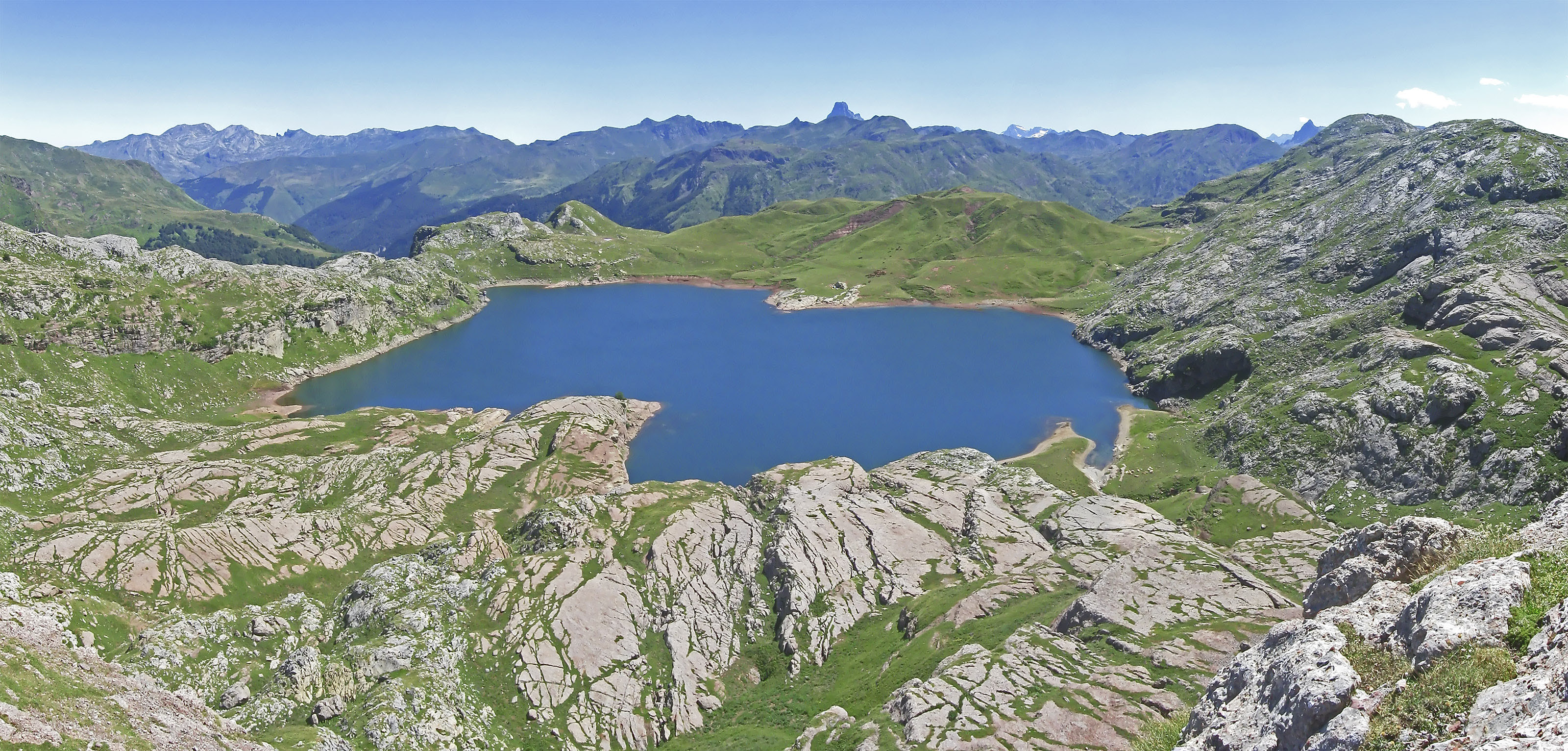 Panorama du lac d'Estaens avec pic du Midi d'Ossau en fond.